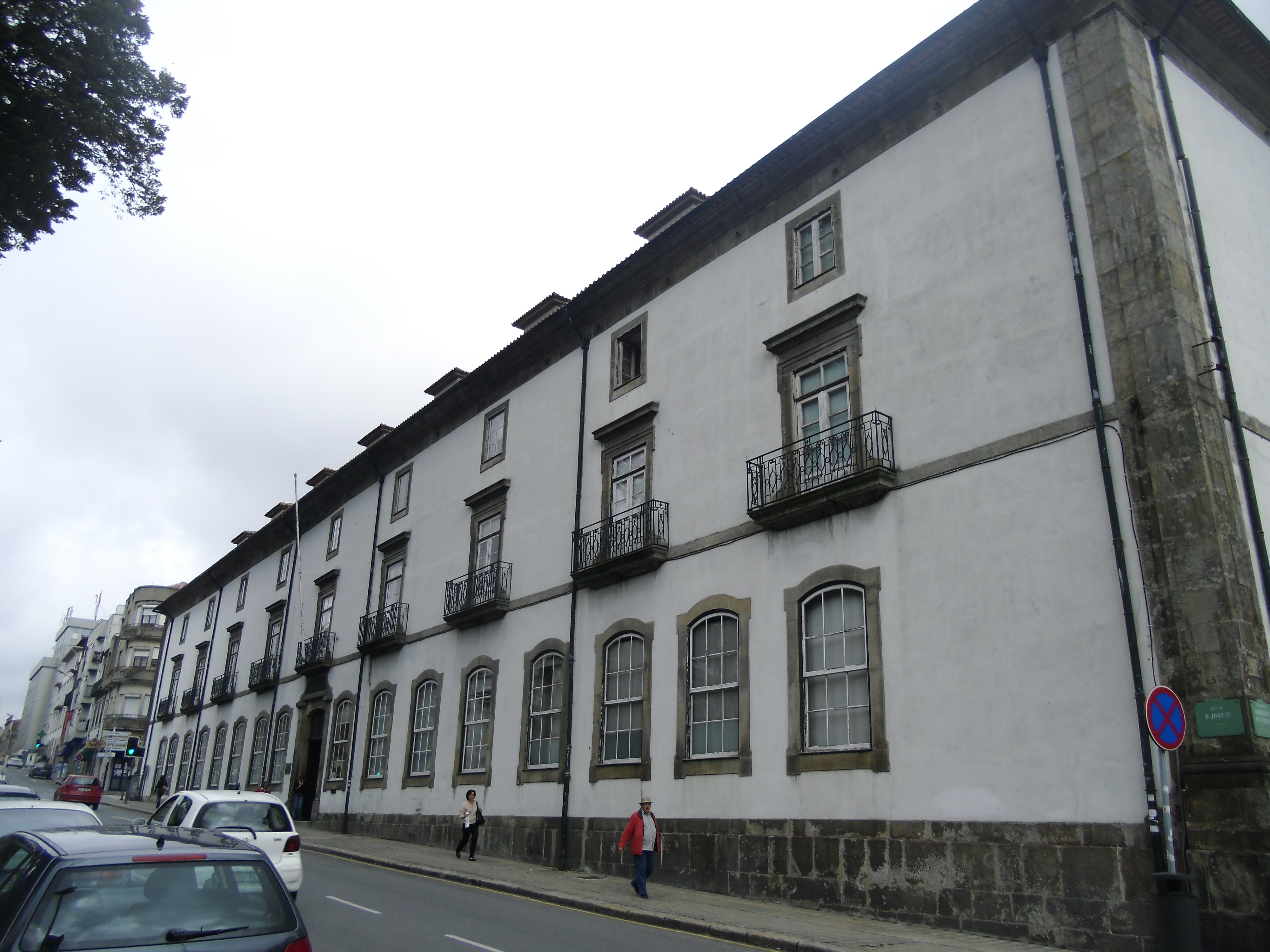 Biblioteca publica municipal do Porto. Em Portuga, Porto, Porto, Santo Ildefonso This file was uploaded for Wiki Loves Monuments in Portugal with the unique identifier 73483.